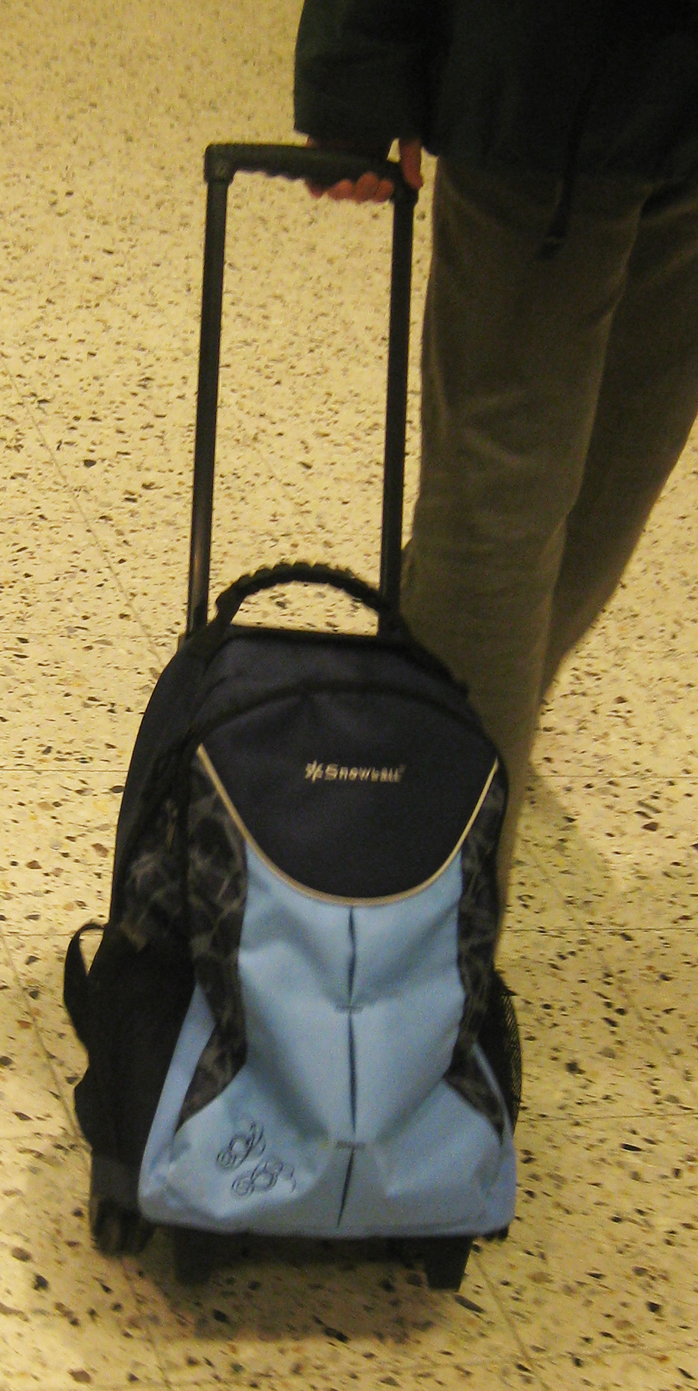 Någorlunda modern variant av dramatenväska.